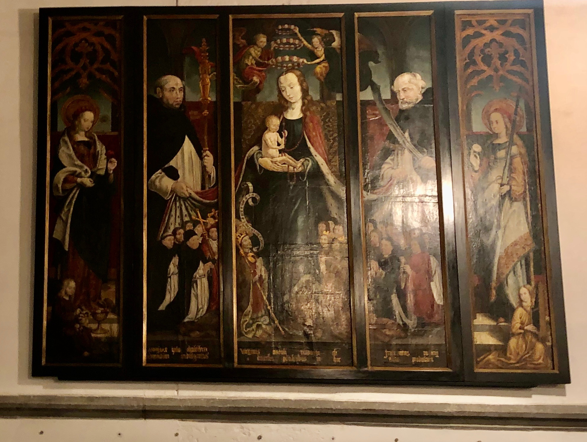 Tafelrentabel: Schutzmantelmadonna, Meister von St. Severin, St. Andreas, Köln